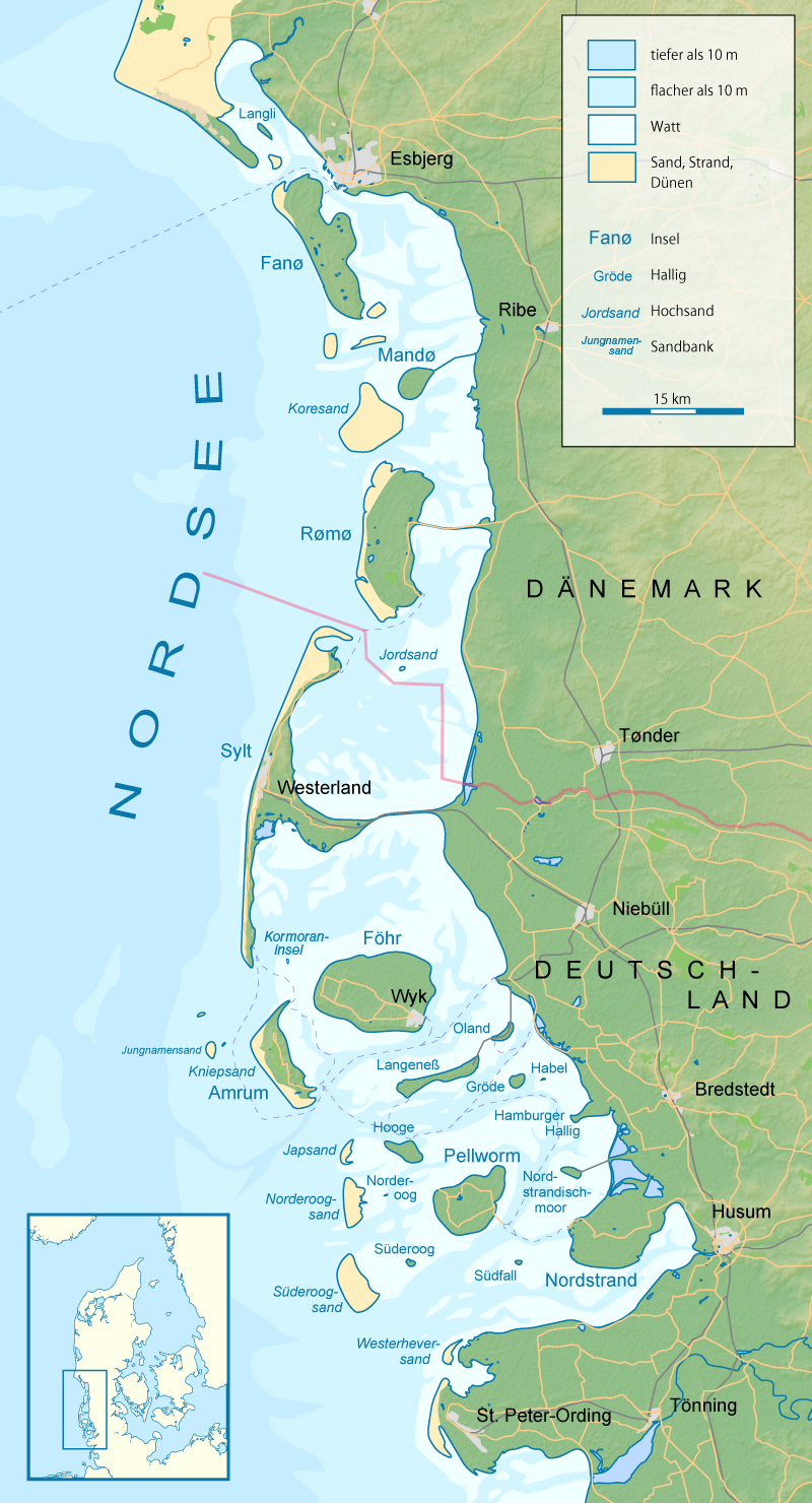 Karte der Nordfriesischen Inseln (Arbeitsversion)